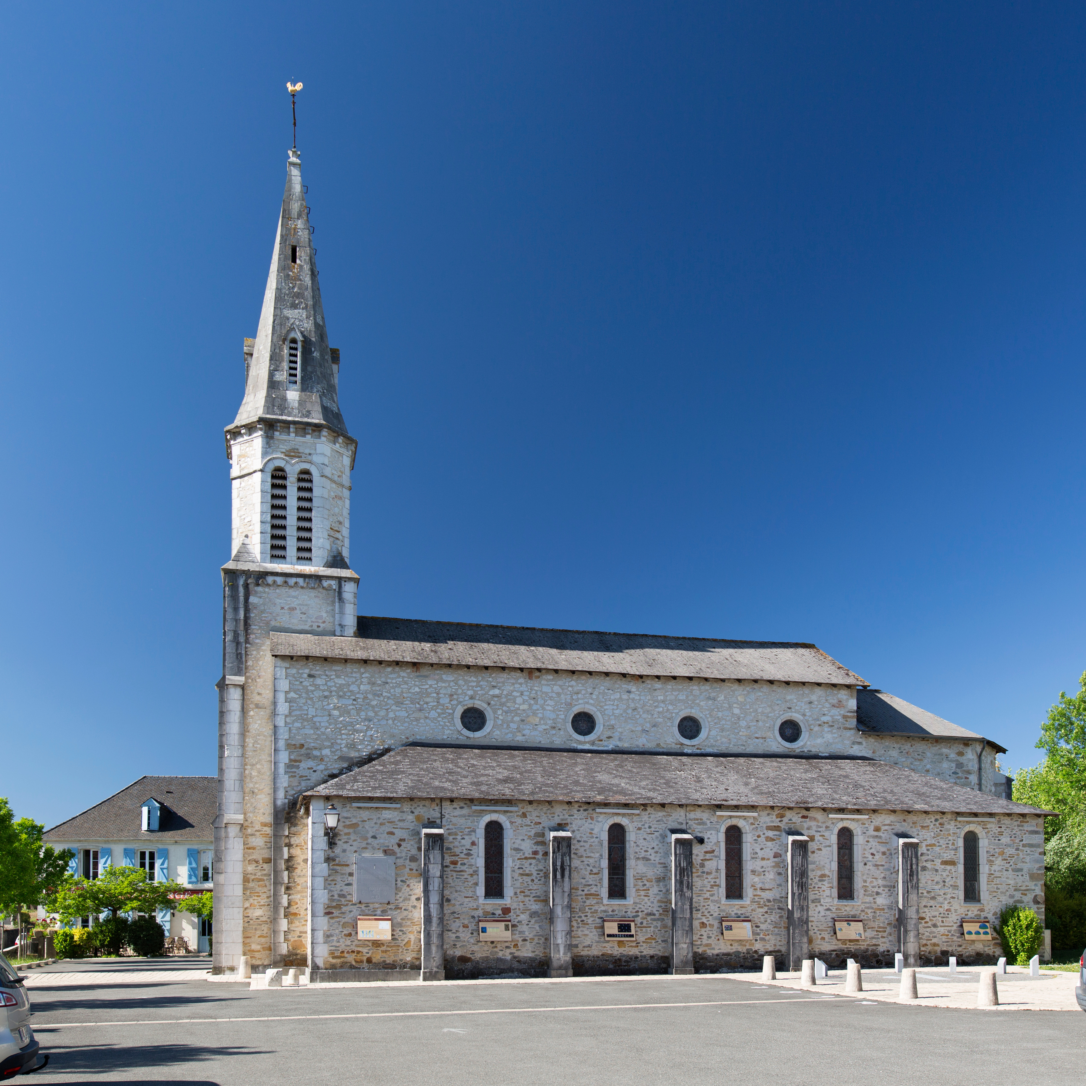 l'église